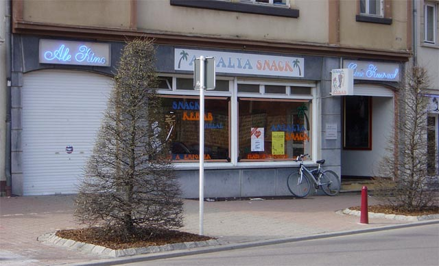 Ciné Kursaal (Ale Kino), Rëmeleng (Abrëll 2005)